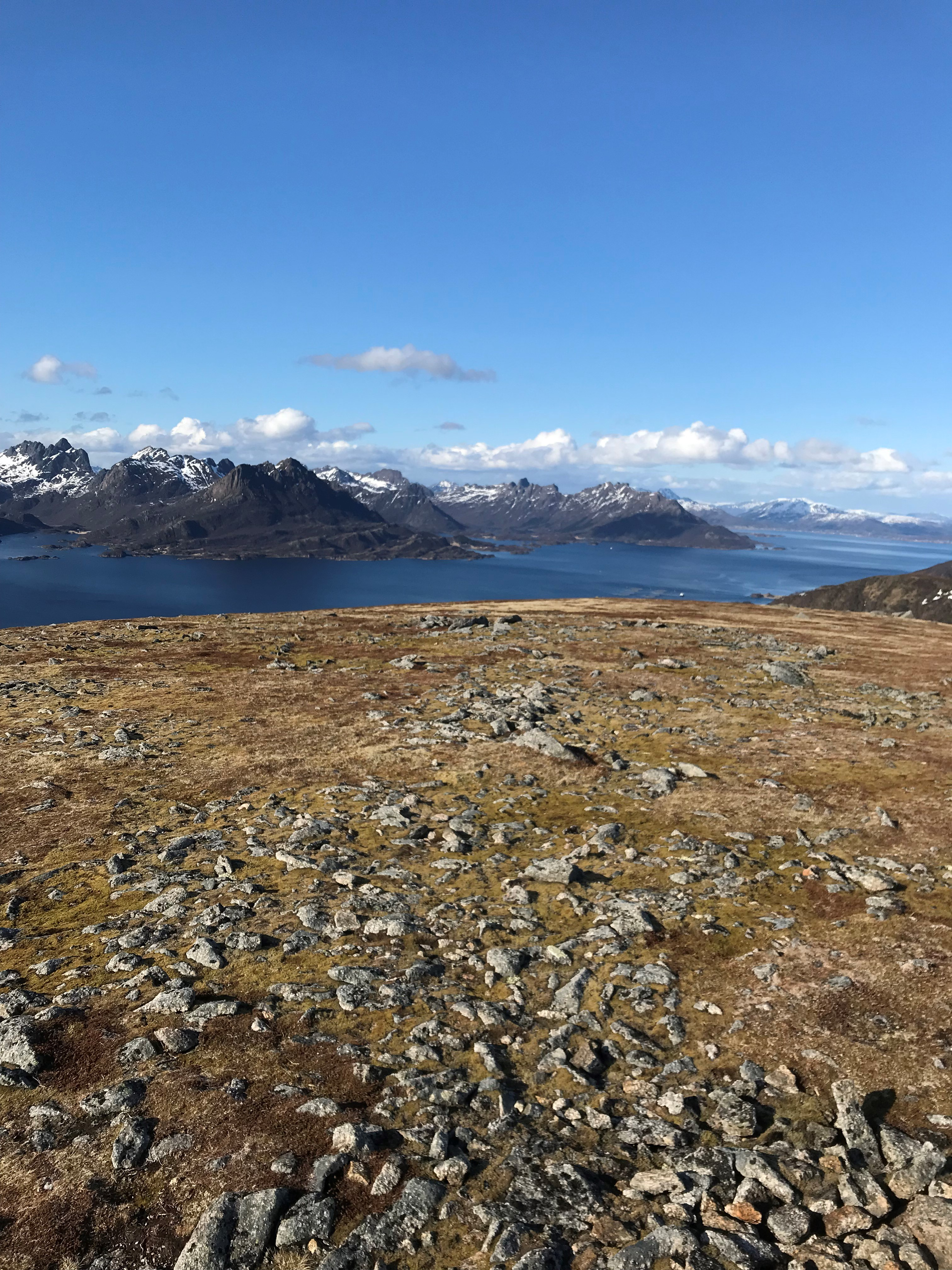 Indre og Ytre Eidsfjord sett fra toppen av Veten i Hadsel.